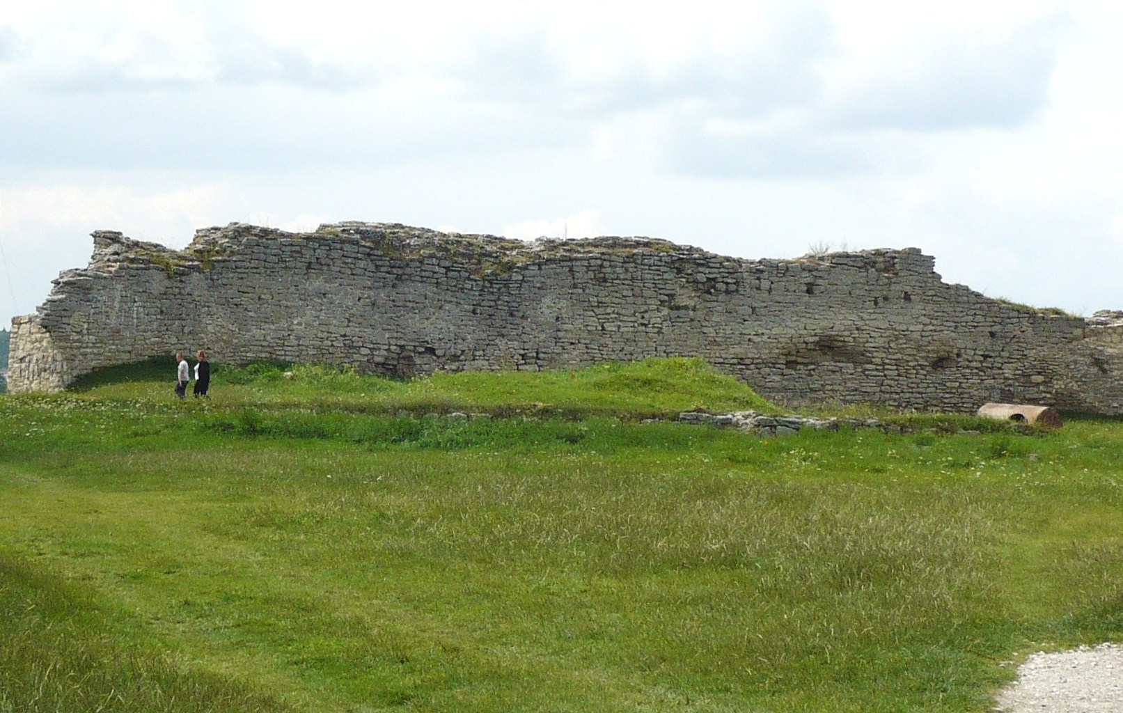 Zamek w Krzemieńcu